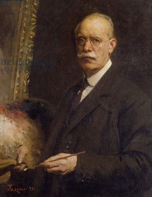 Self-portrait